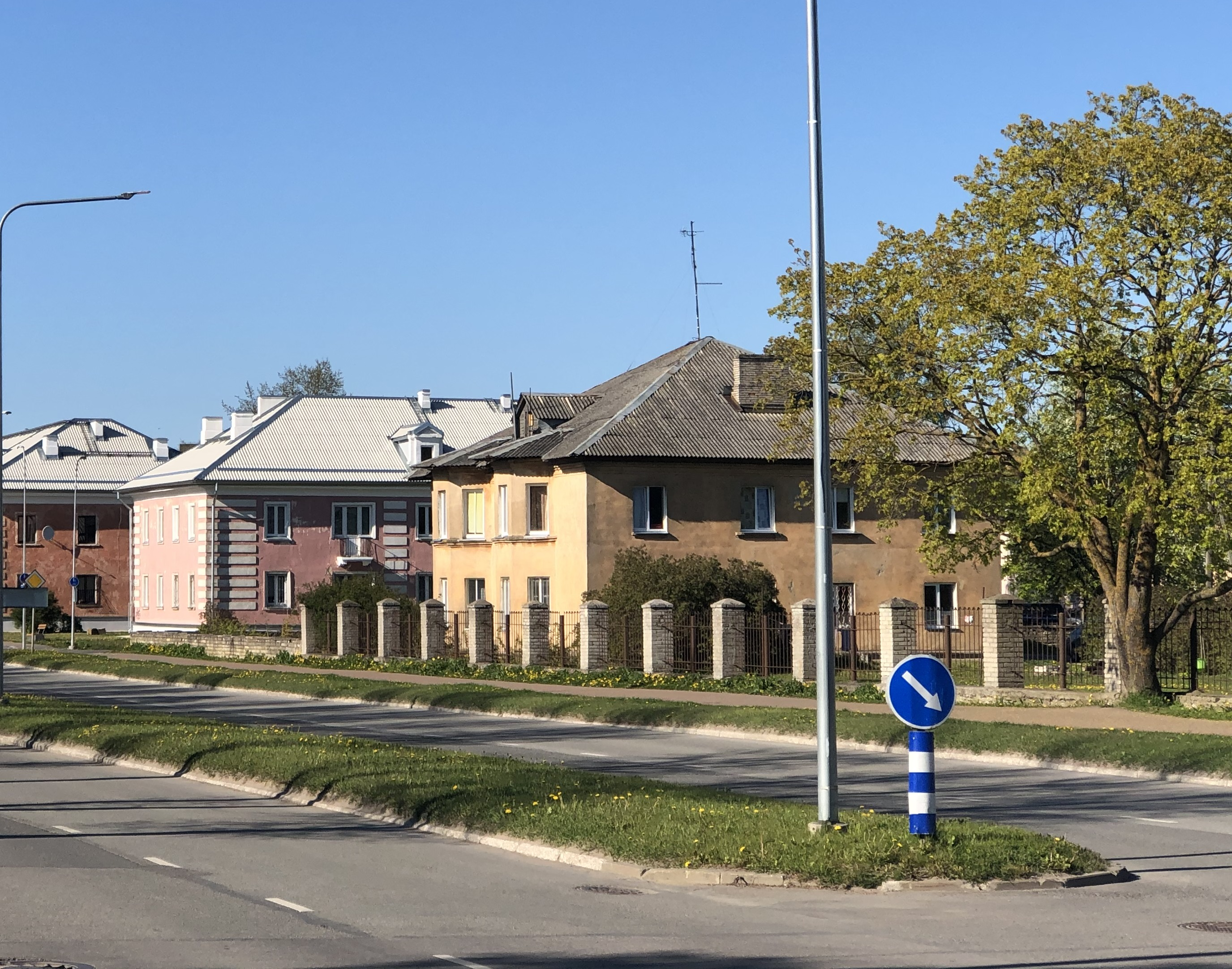 Majad aadressil Haigla tänav 11 (esiplaanil) ja 16 (tagaplaanil) Narvas. Vaade Kreenholmi prospektilt